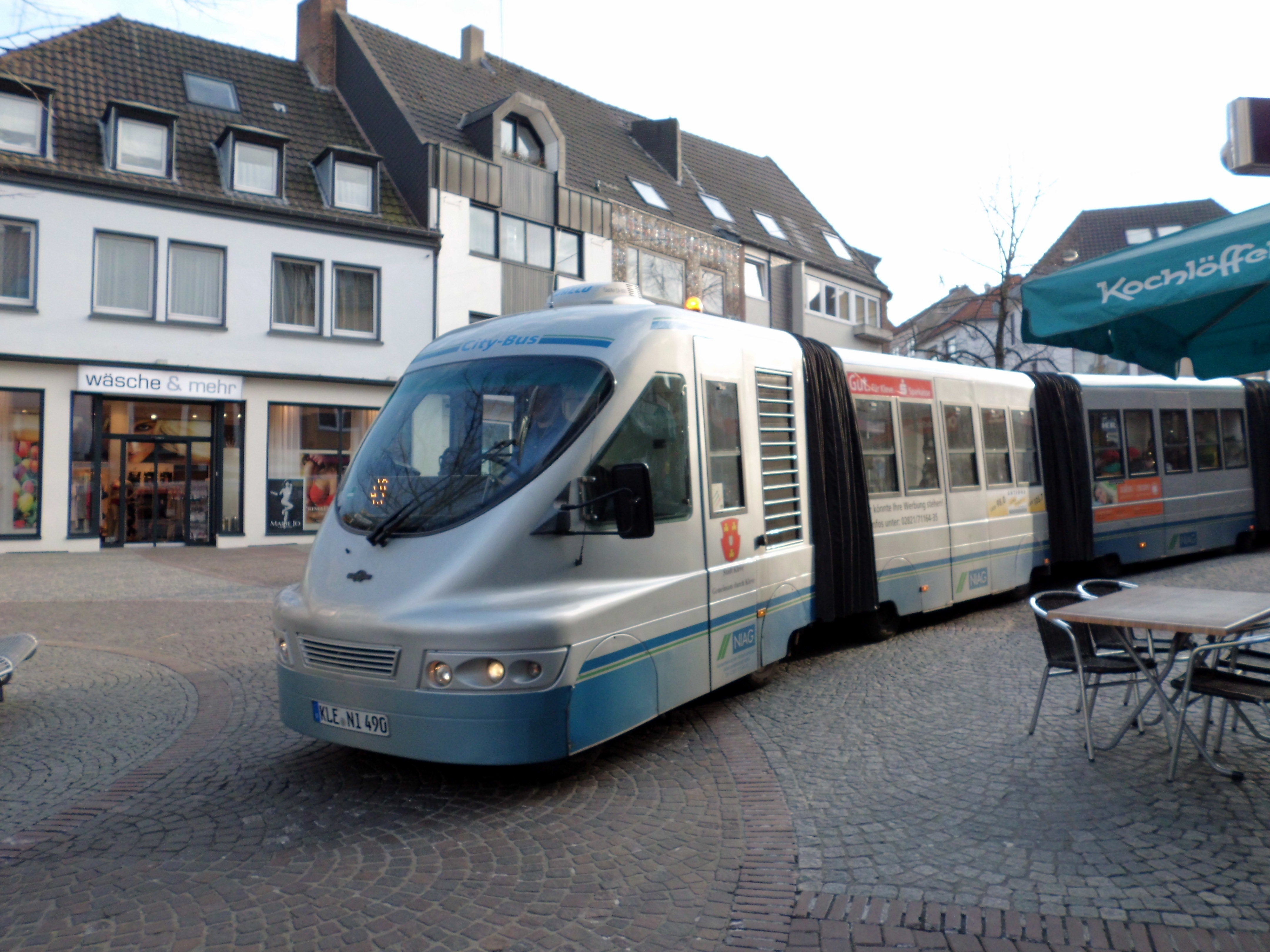 City-Bus in der Innenstadt von Kleve. Das Fahrzeug ist ein Dotto Trains TM970.